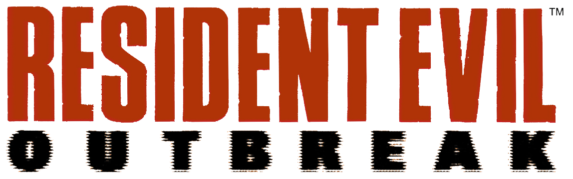 European Resident Evil Outbreak logo